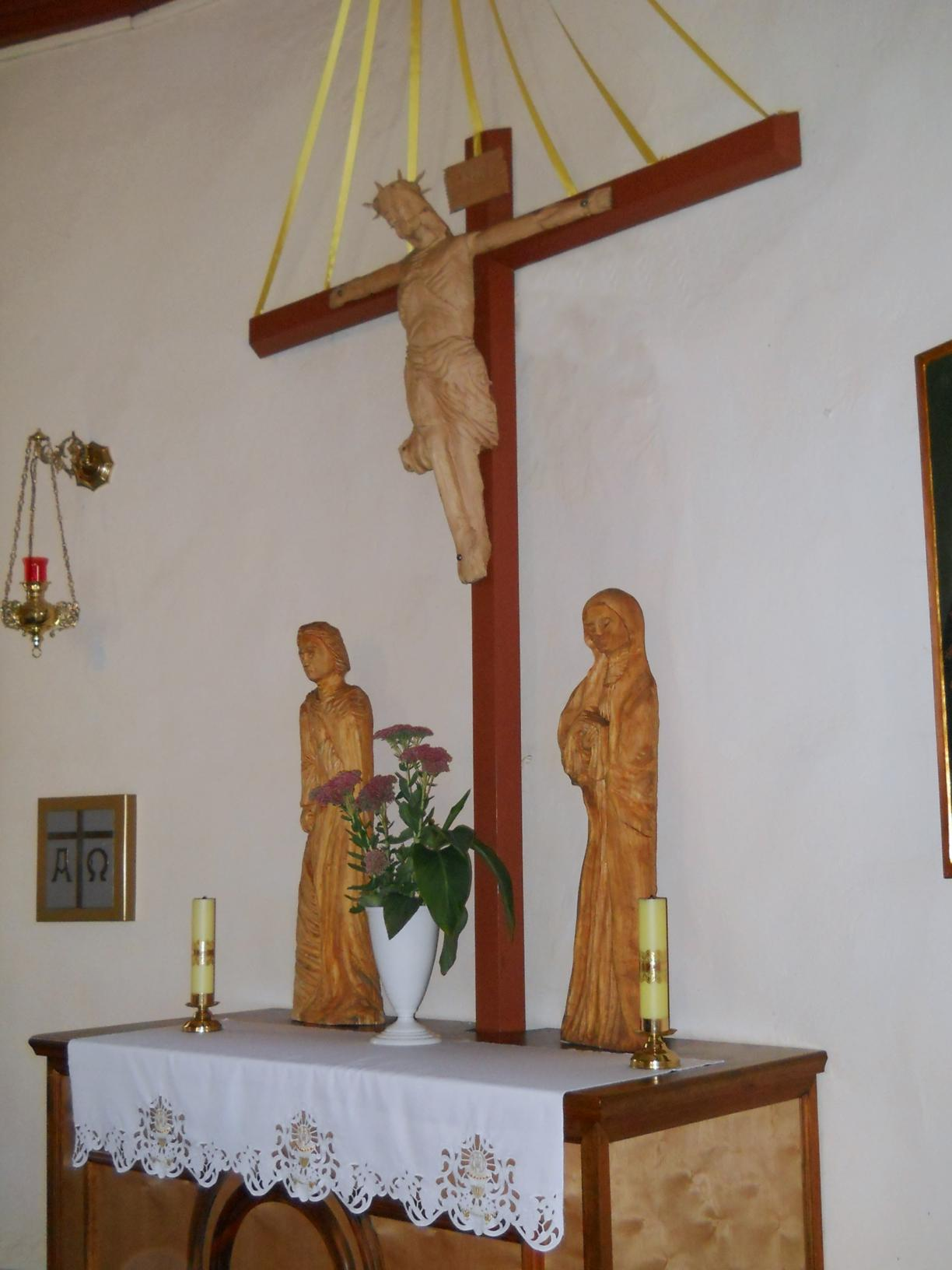 Kościół w Wojcieszycach. Rzeźby ołtarzowe.